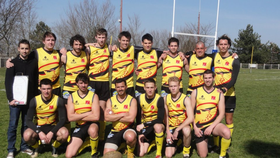 Match contre Toulouse, le 10/03/2012